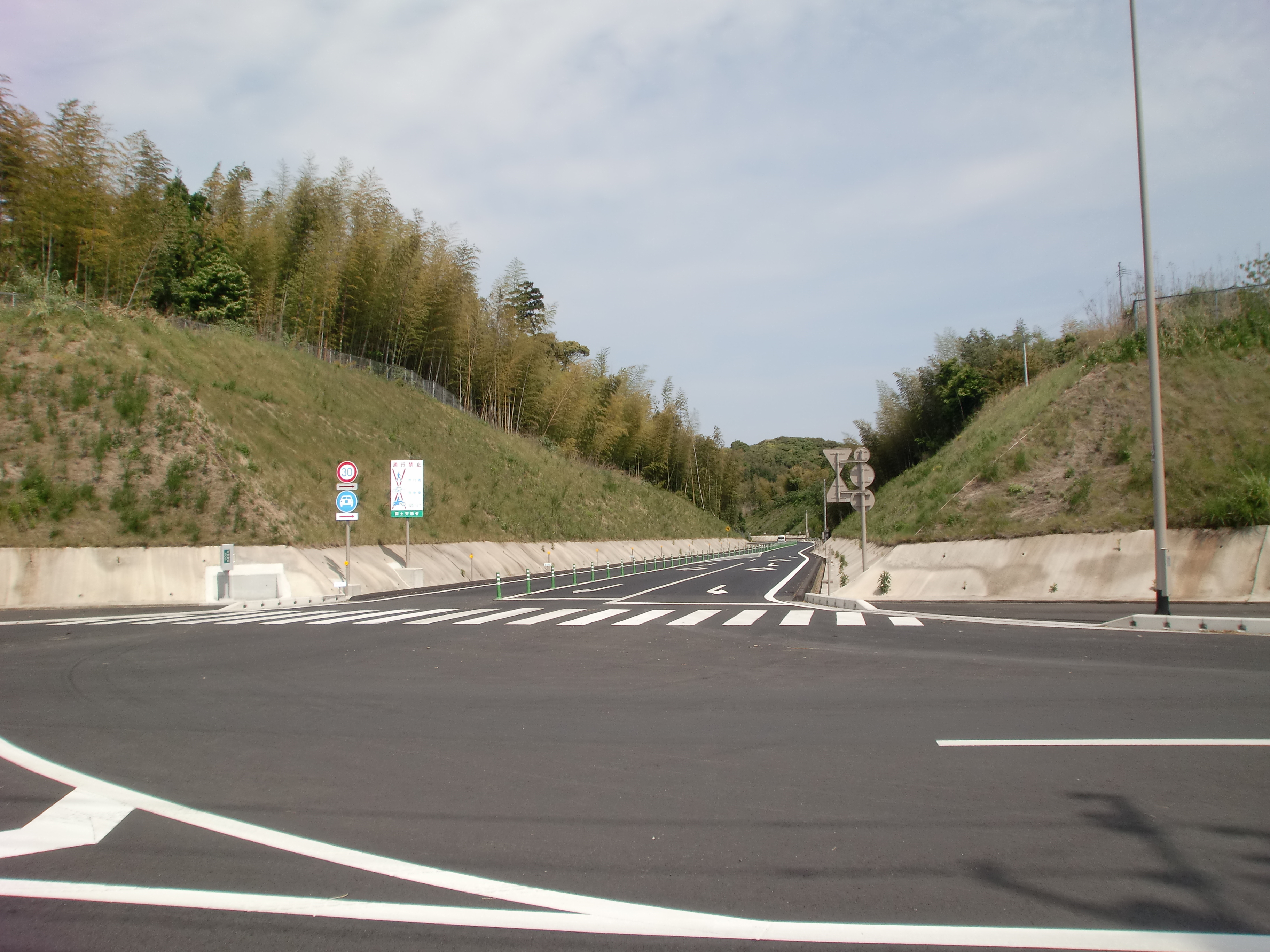 南九州西回り自動車道阿久根インターチェンジの出入口。